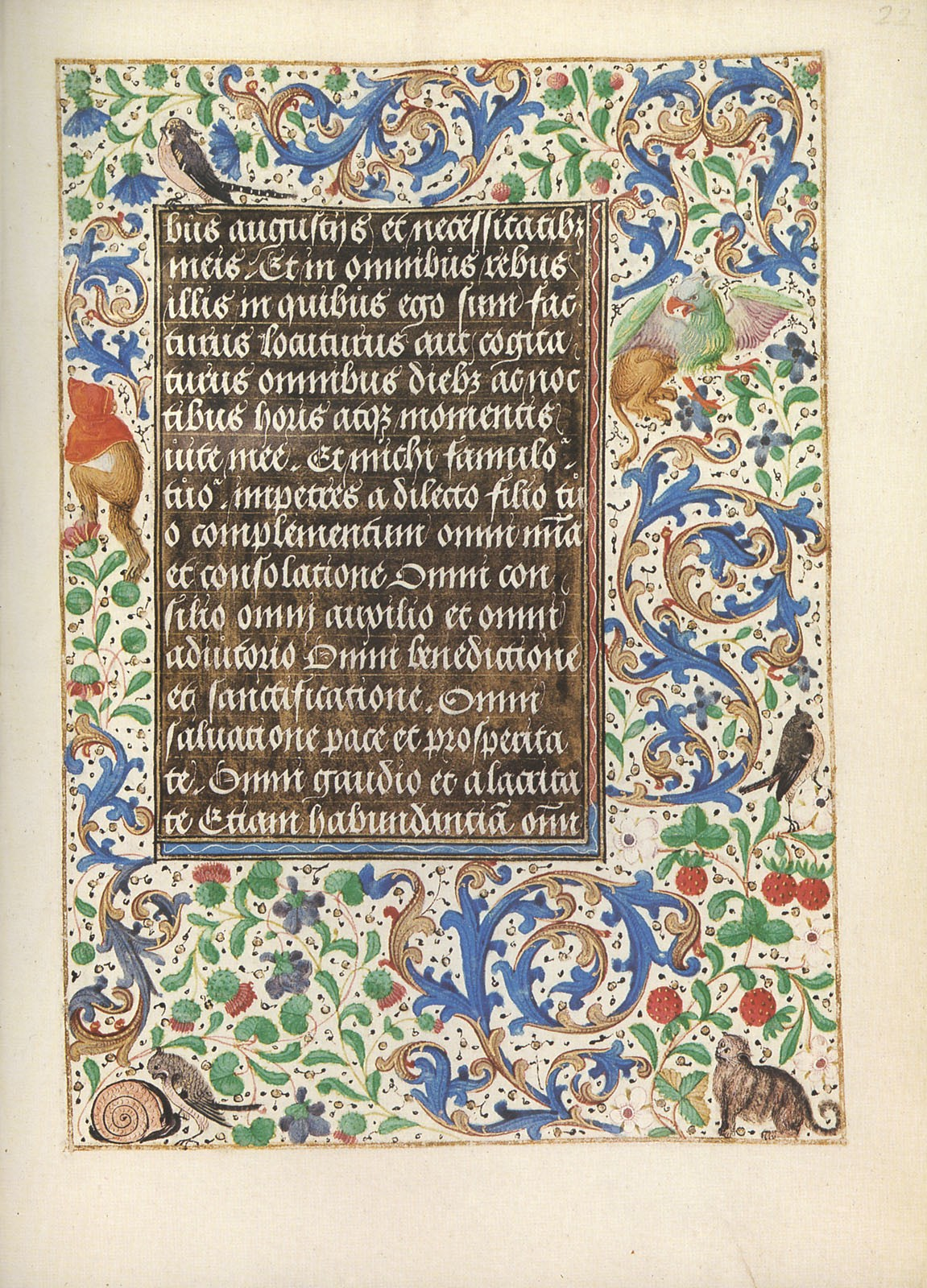 Wien, Österreichische Nationalbibliothek, cod. 1857, Stundenbuch der Maria von Burgund. In: Franz Unterkirchner (Hrsg.): Das Stundenbuch der Maria von Burgund. Codex Vindobonensis 1857 der Österreichischen Nationalbibliothek (Glanzlichter der Buchkunst), Darmstadt 1993.